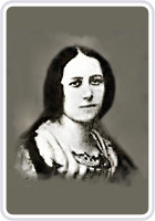 Foto della poetessa italiana dell' 800